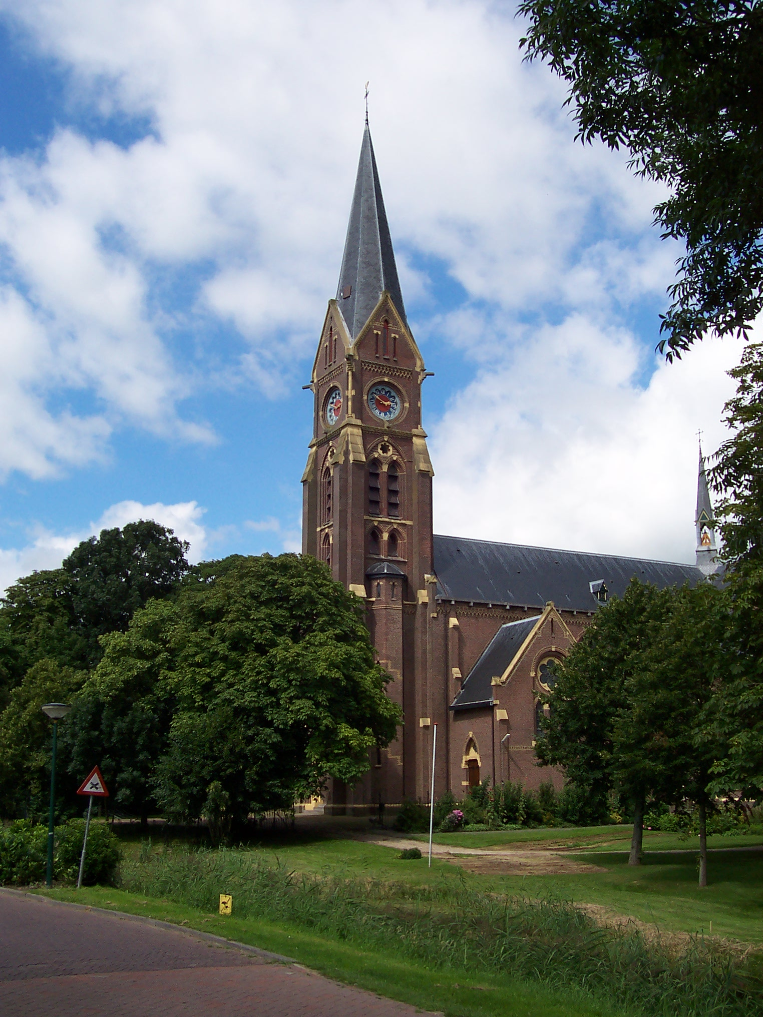 Blauhûs, Sint-Fitustsjerke